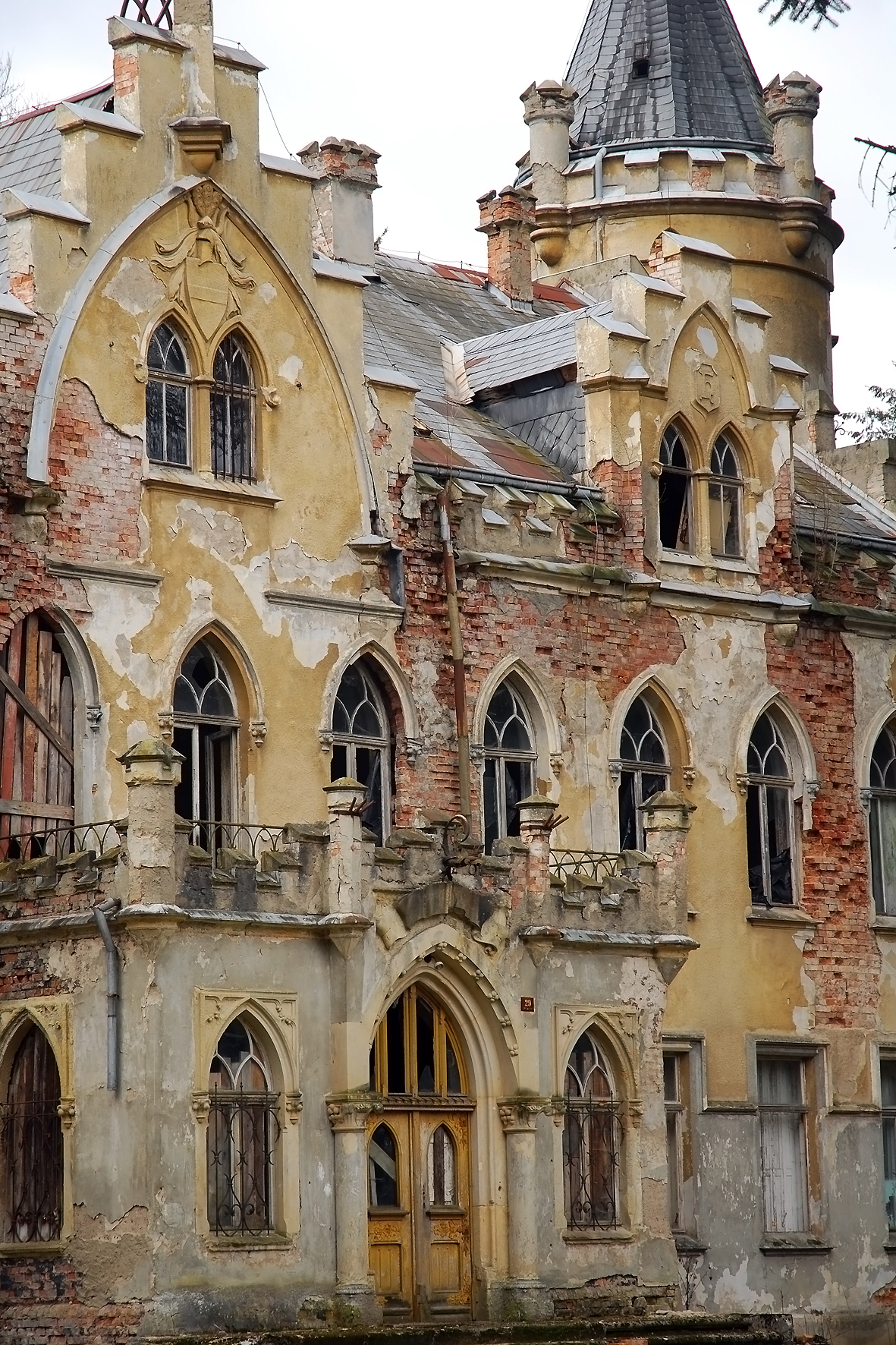 Podwilcze - pałac